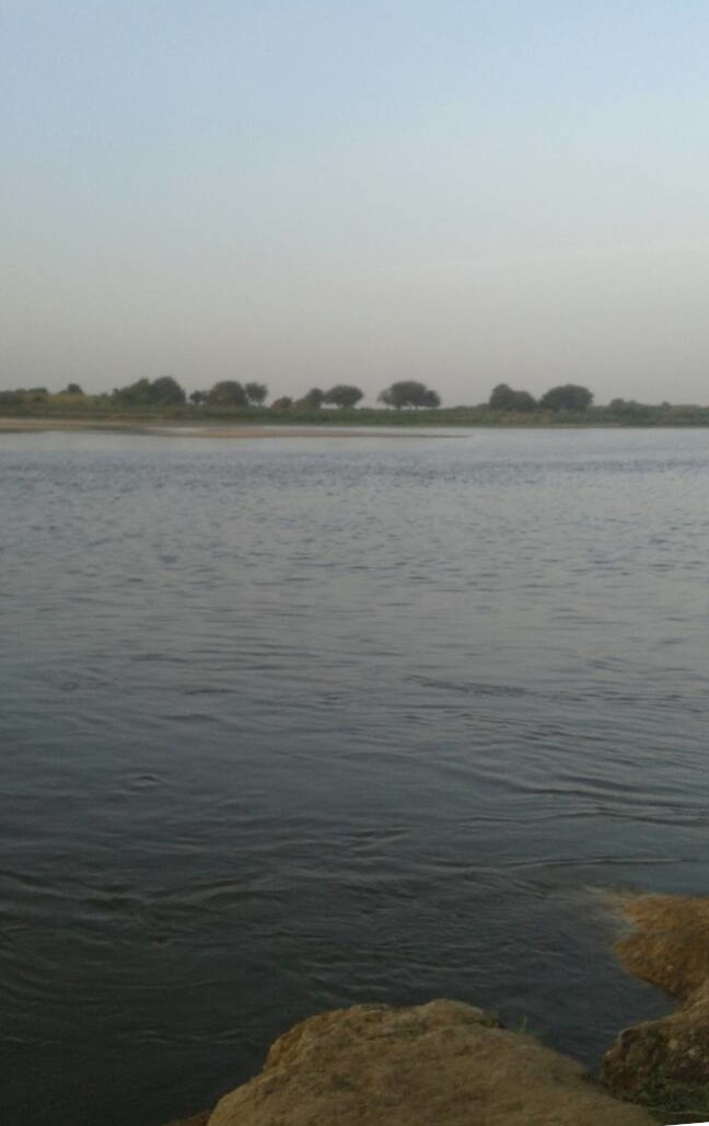 الشيمة